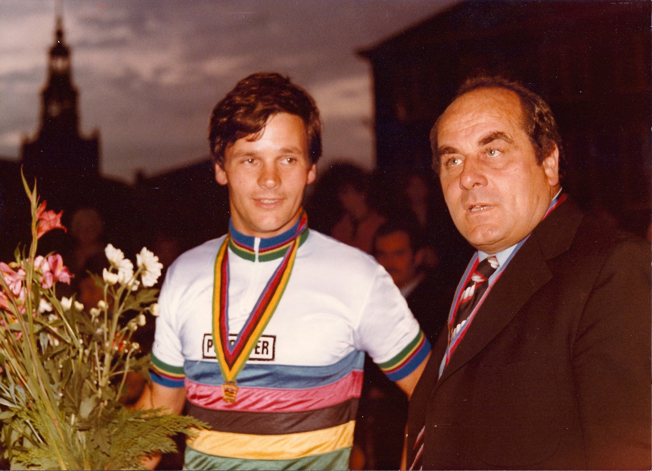 Martin Venix en Noppie Koch